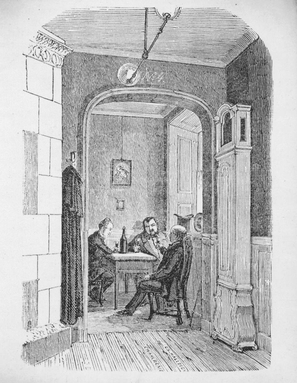 Tre Remmare, Regeringsgatan 47 (Skubben nr 4)